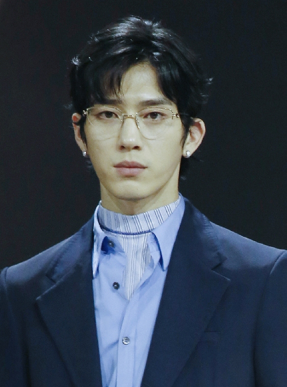 中文（中国大陆）: 2020年1月11日，井柏然于微博之夜